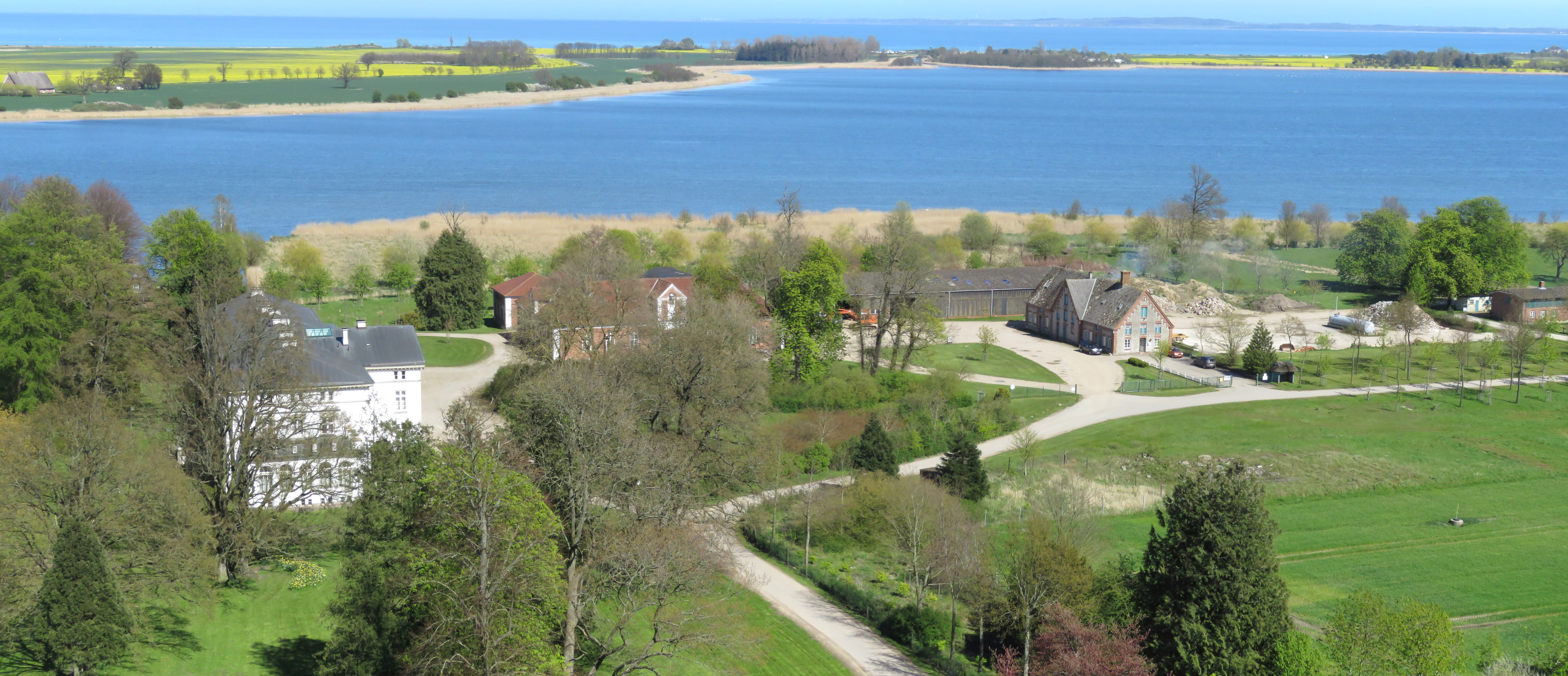 Gutsverwaltung Waterneverstorf